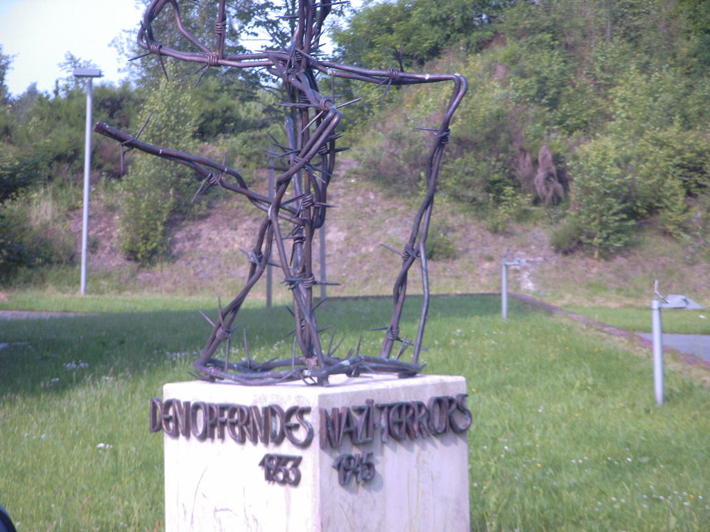 Stolberg, Zinkhütter Hof, Denkmal für die Opfer des Nationalsozialismus, umstritten wegen der Verwendung des Hakenkreuzsymbols, wenn auch der Stacheldraht eindeutig auf die Brutalität des Naziregimes hinweist.